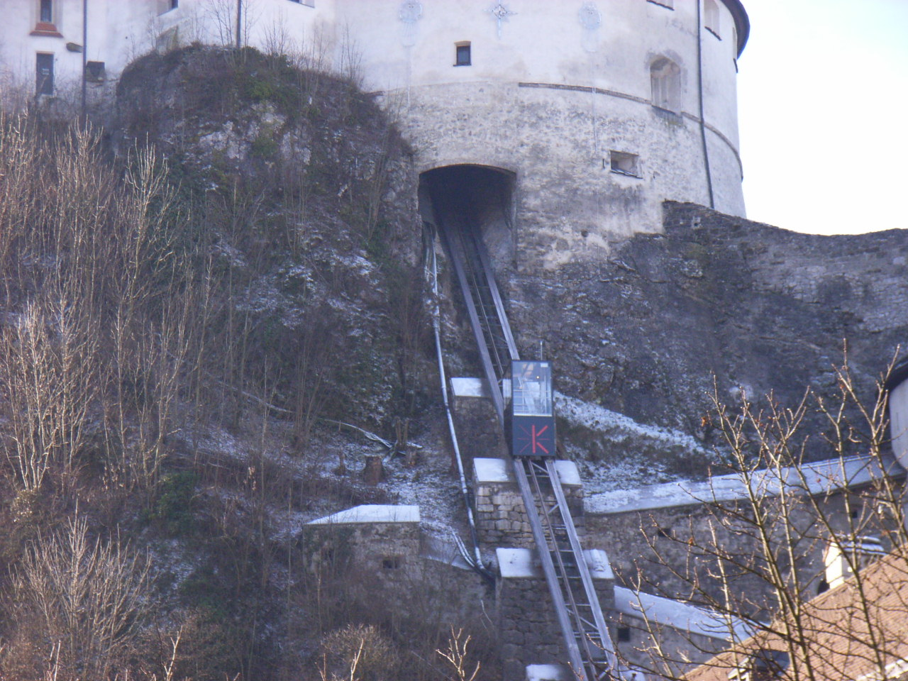 Standseilbahn zur Festung Kufstein